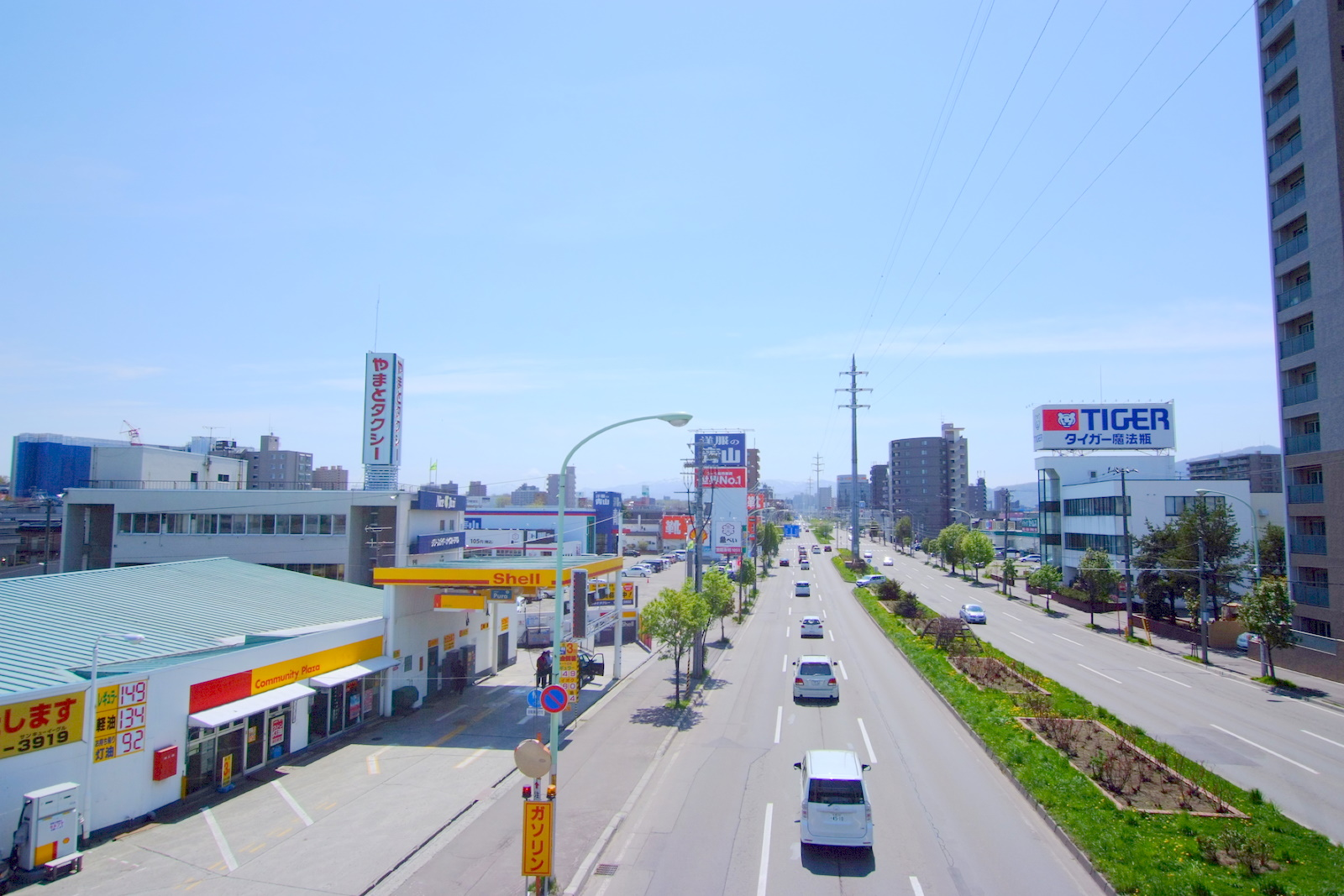 Route 89